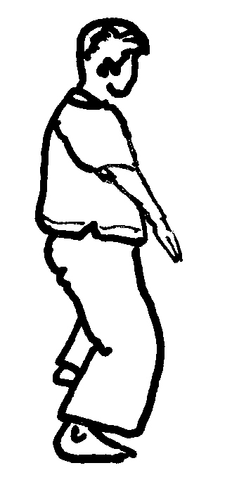 minzin0.jpg